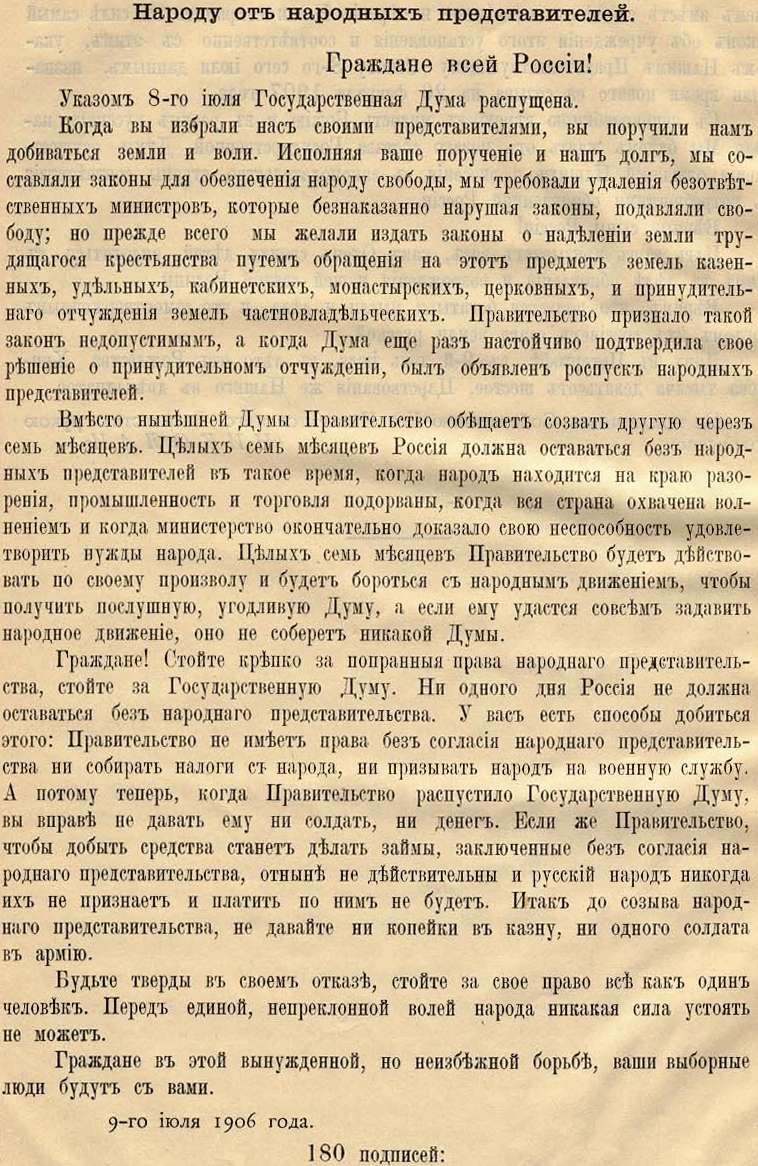 Выборгское воззвание, фотокопия документа.